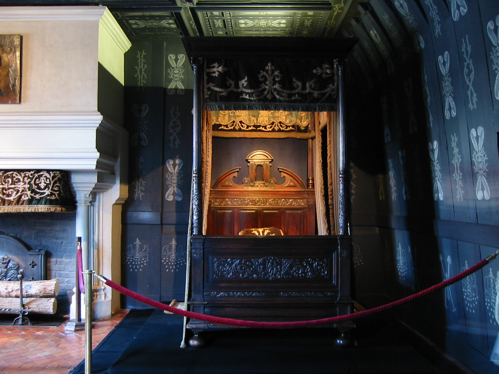 Fireplace and four poster bed, chambre Louise de Lorraine at Chateau de Chenonceau in France.